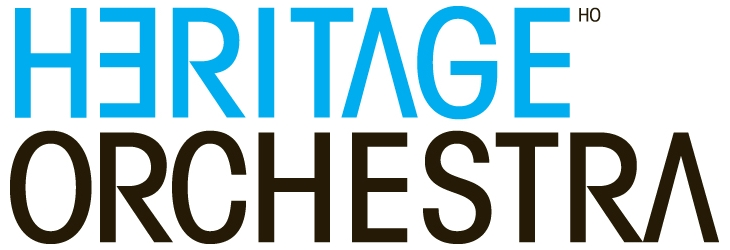 Logo des Heritage Orchestra